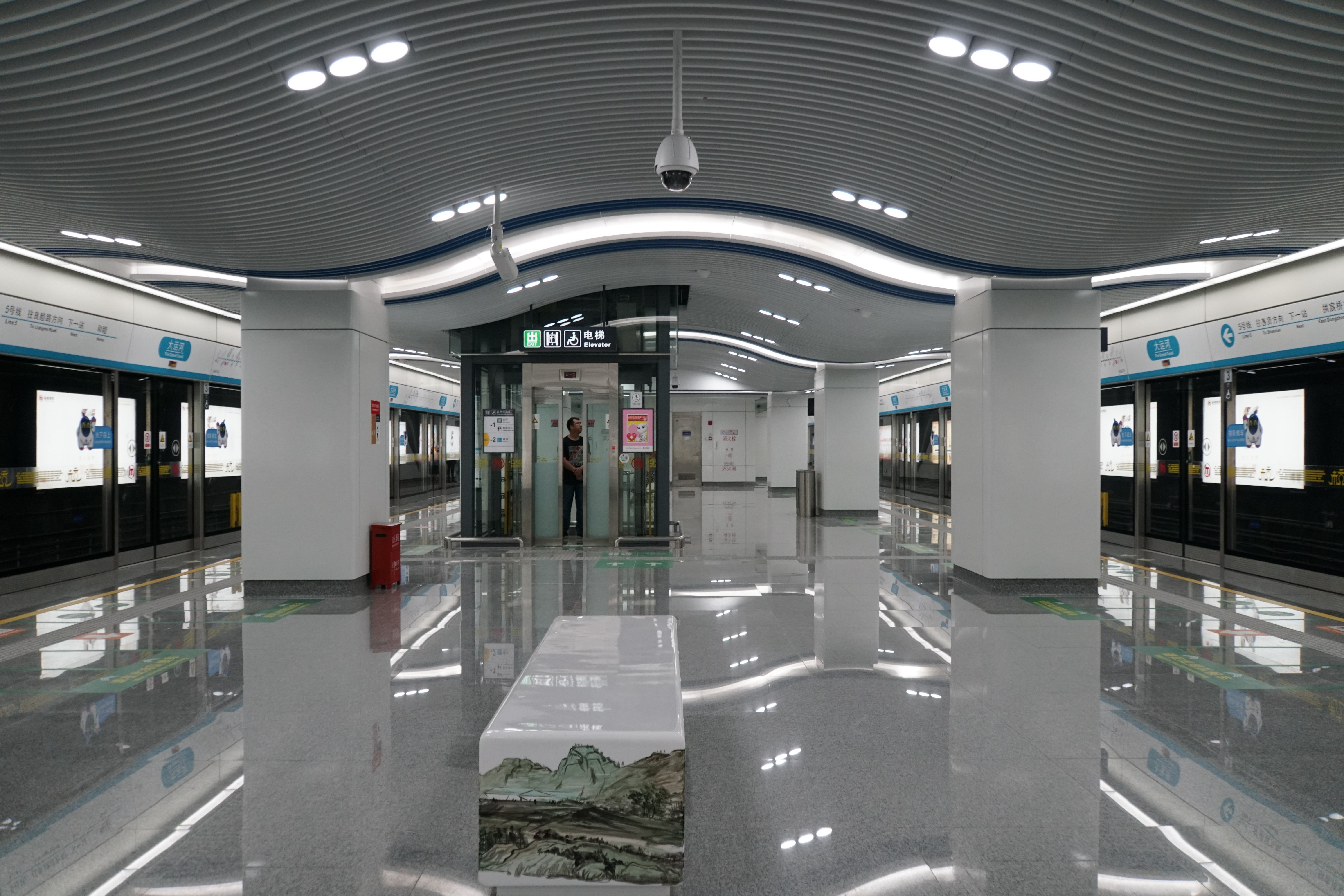 杭州5号线大运河站站台